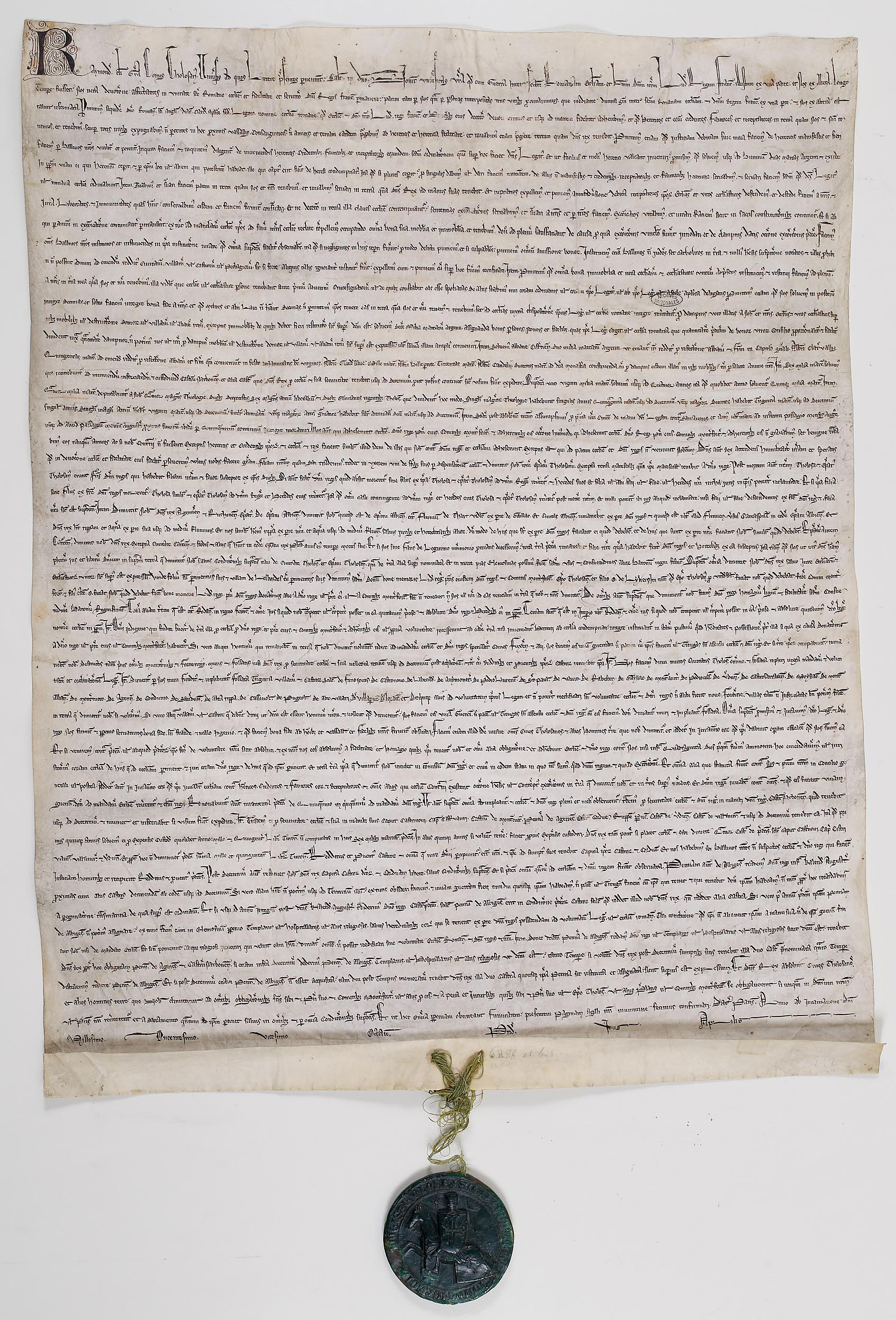 Charte en latin de Raymond VII, comte de Toulouse, portant ratification du traité de Meaux-Paris. Paris le 12 avril 1229